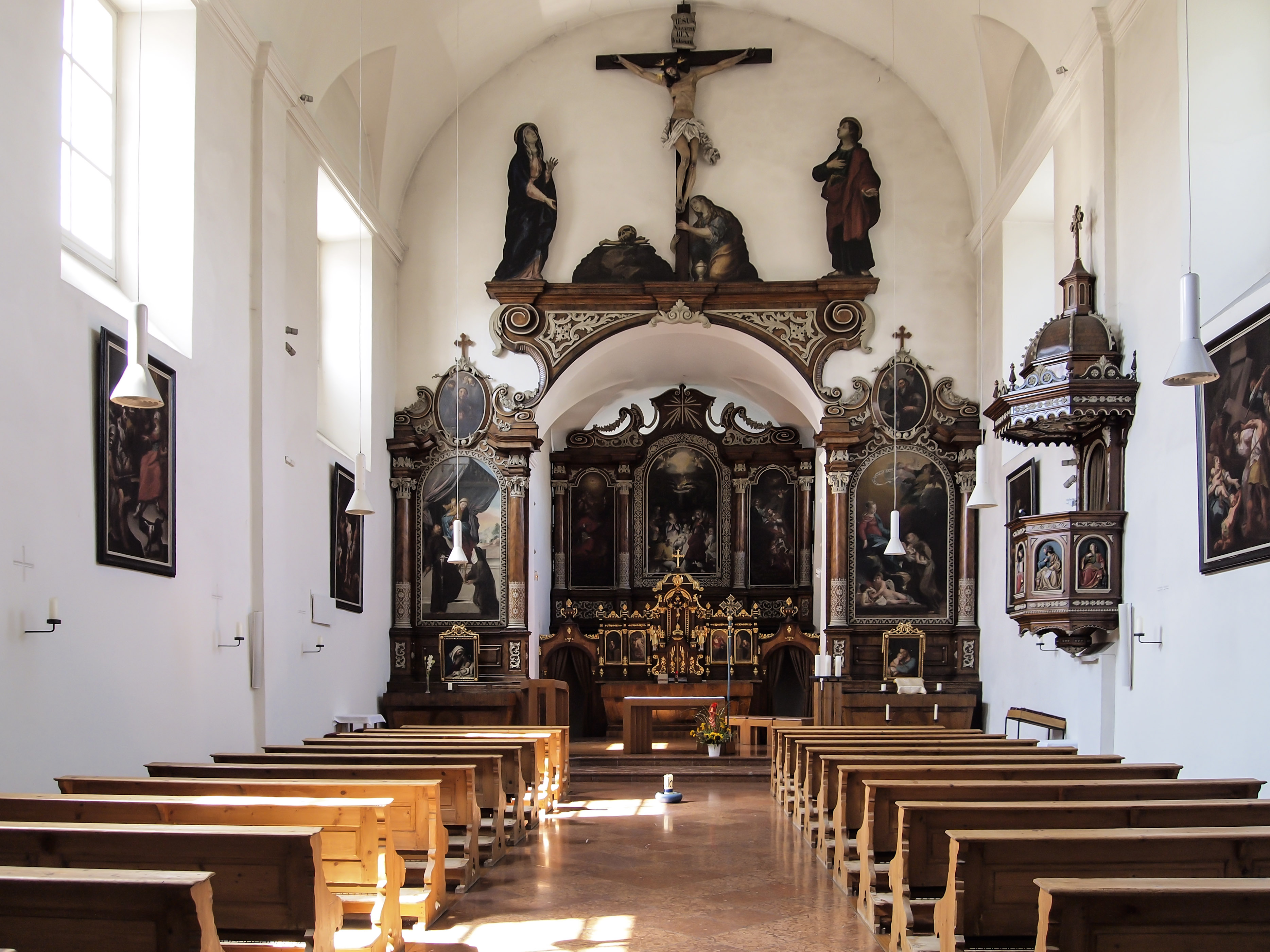 Kapuzinerkloster und -kirche, hl. Bonaventura, Trompeterschlössl und Mauern